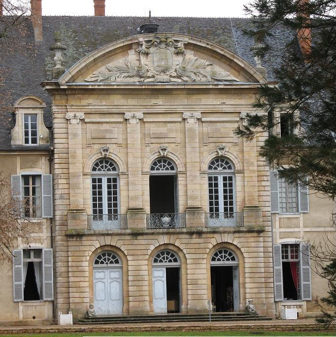 château de la Ferté - aint-Ambreuil (Saône-et-Loire)